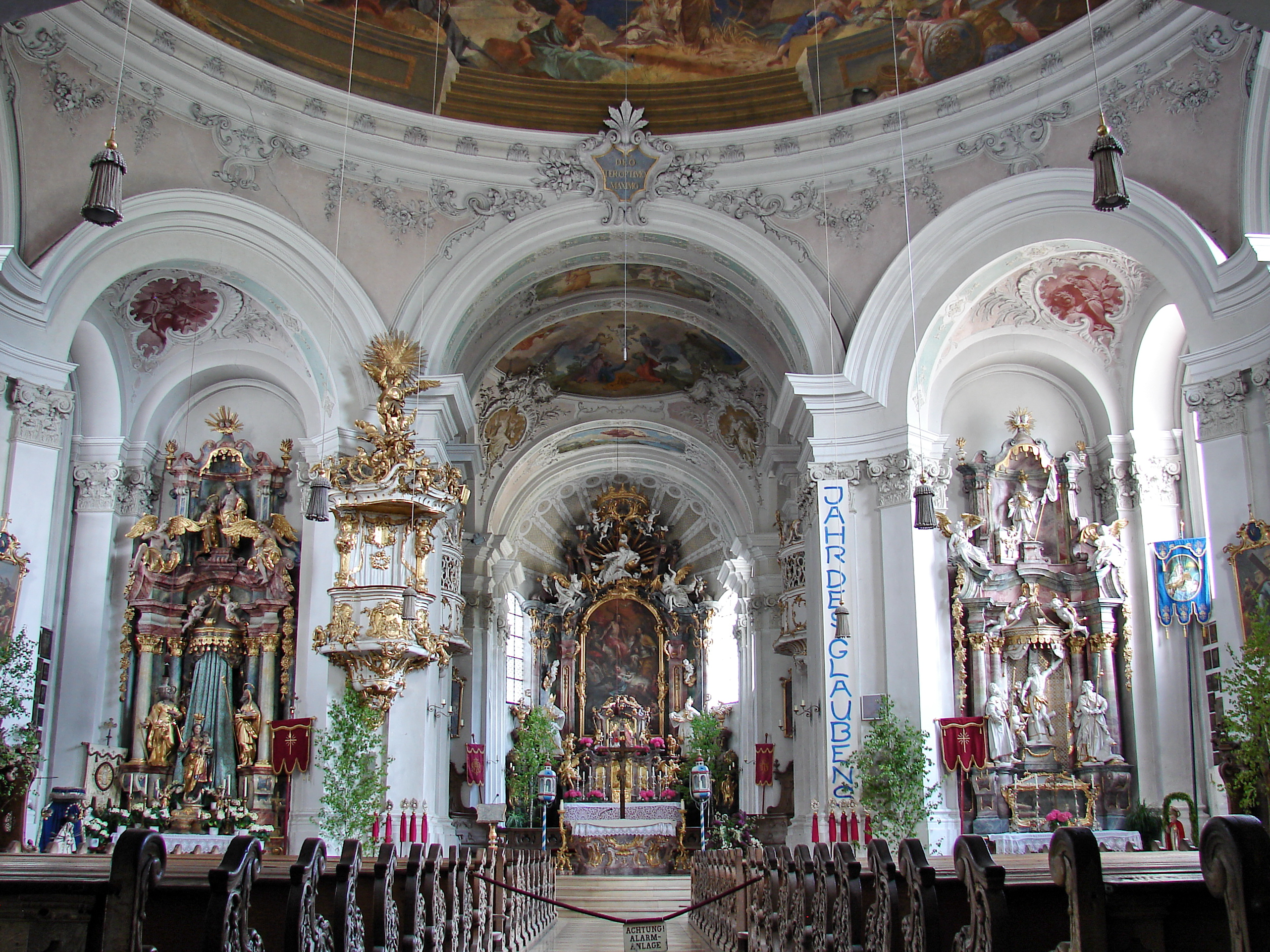 Barocker überkuppelter Acht-Arkadenraum mit vorgesetztem dreischiffigem Emporenjoch, zentralisierender Choranlage und südöstlichem Zwiebelturm, Langhaus 1717-21, Chor 1725-27, 1730-32 Turmerhöhung auf gotischem Unterbau; mit Ausstattung.